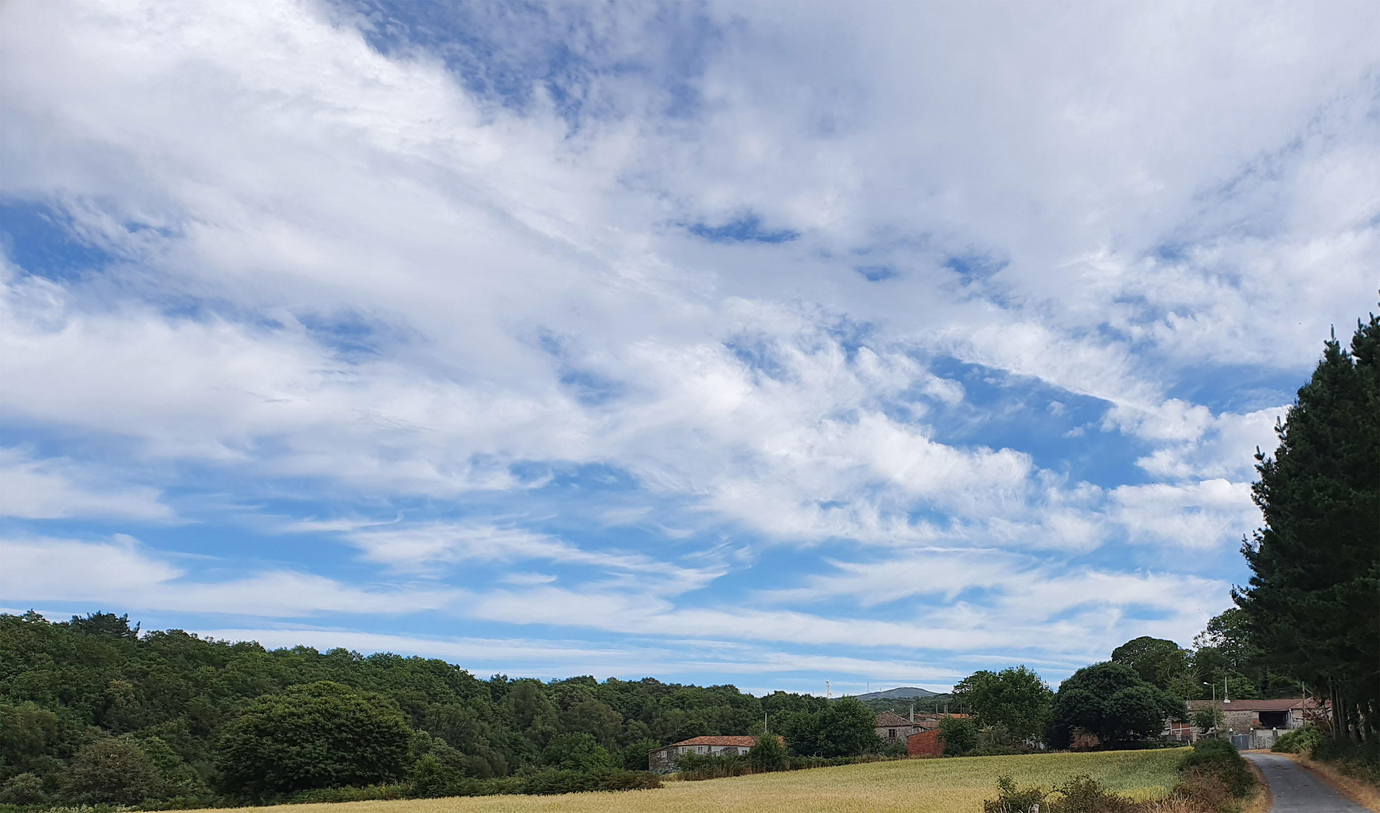 Lugar de Bellós, da parroquia de San Fiz de Amarante, en Antas de Ulla (Lugo)